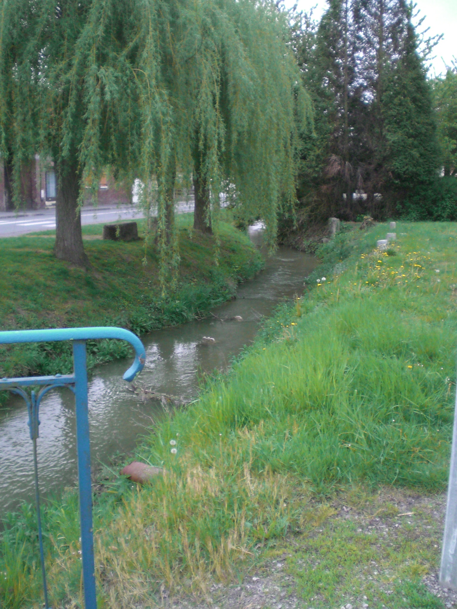 La Tortille au carrefour de Moislains vers le sud au 1er mai 2010